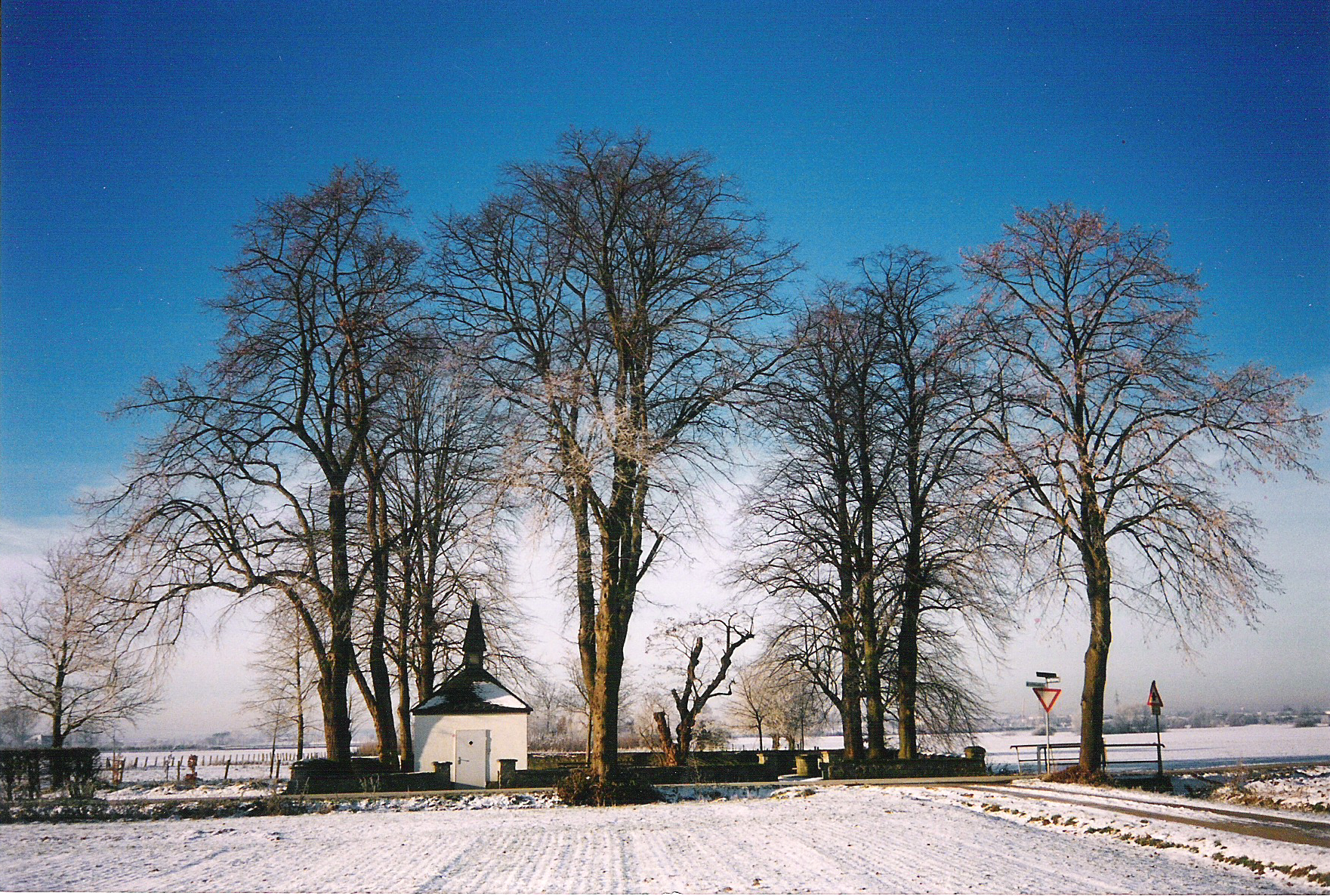 Das Brünneken 1997